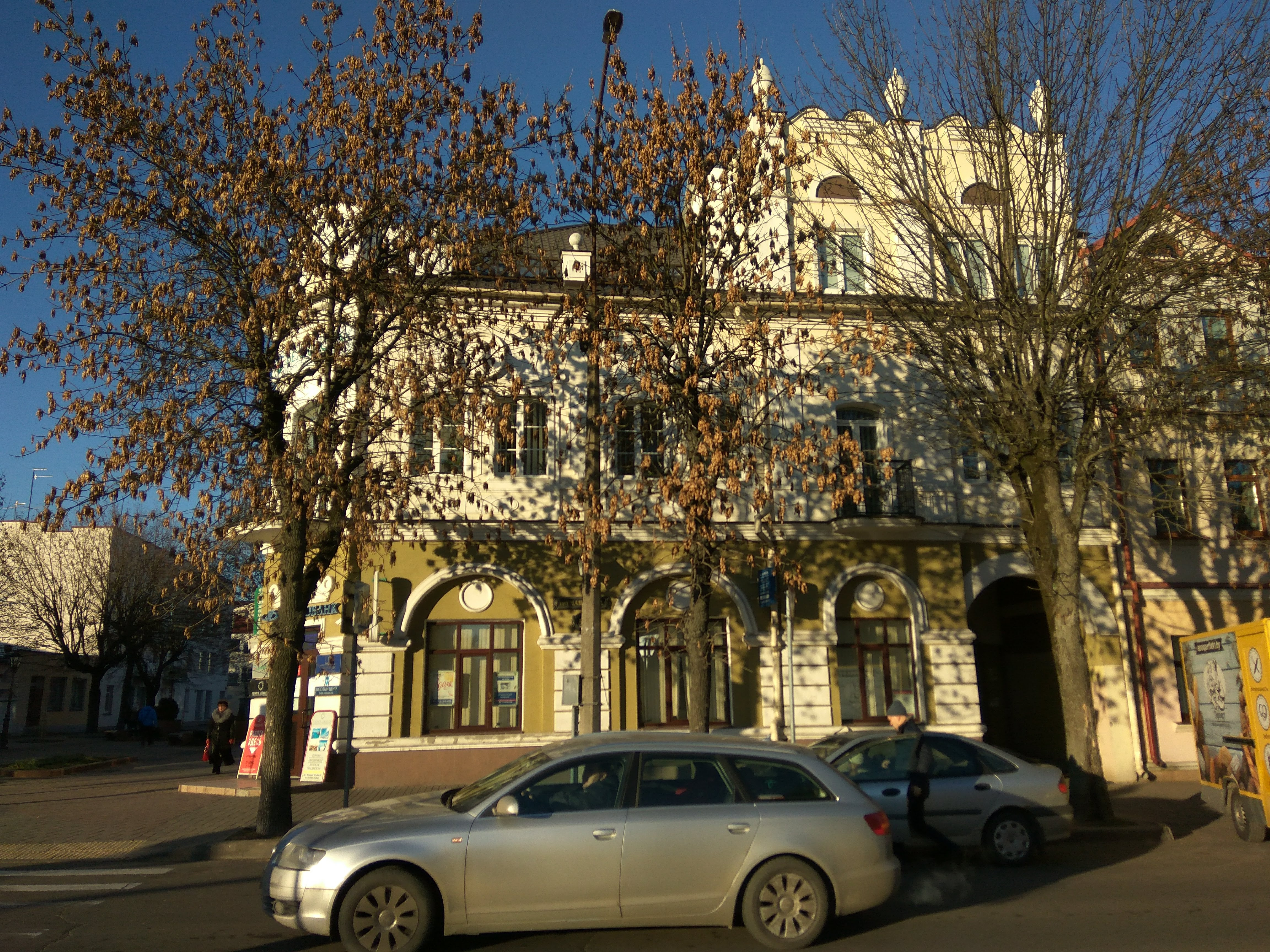 Брэст. Праспект Машэрава